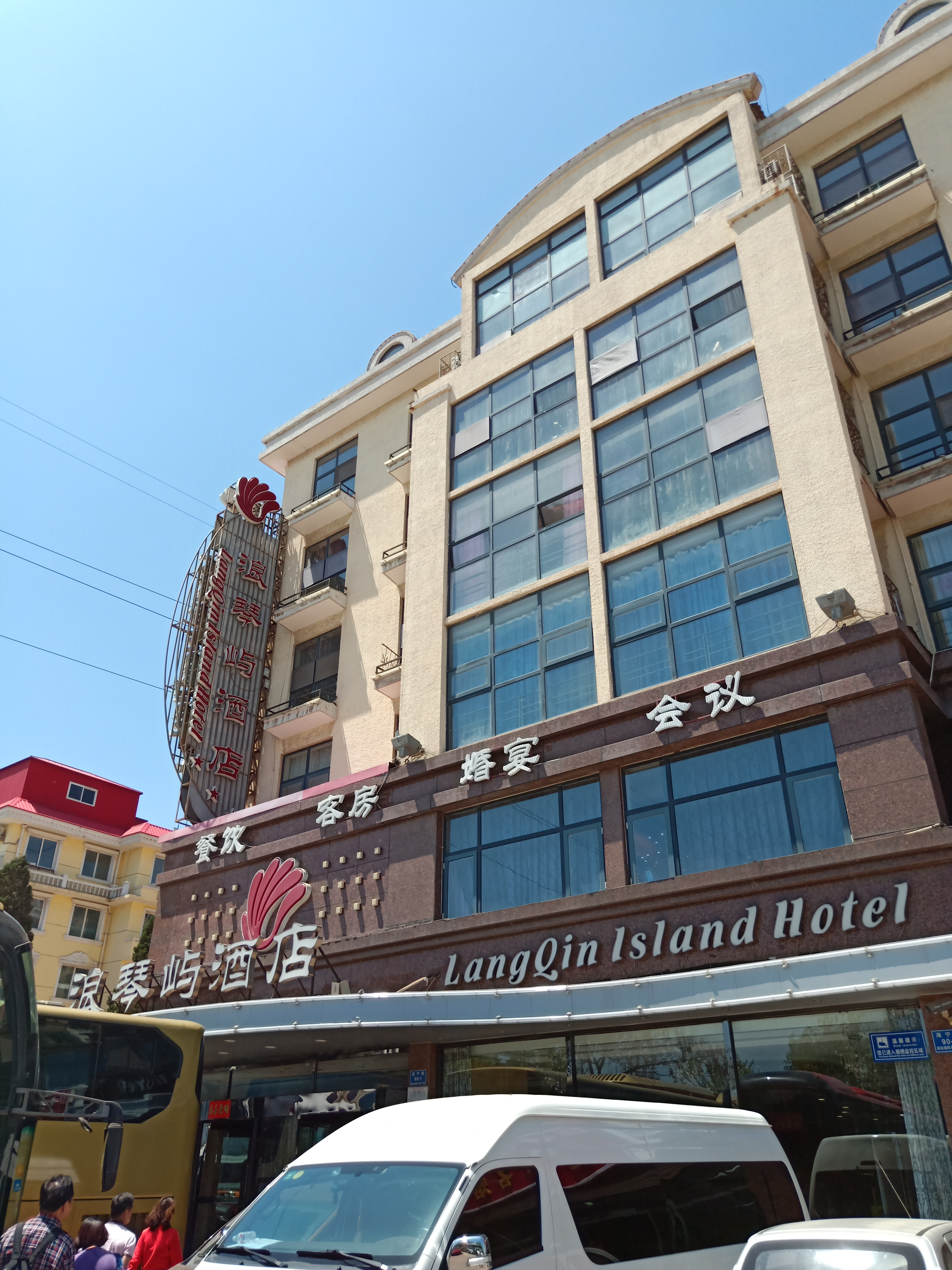 粵語: 浪琴嶼酒店